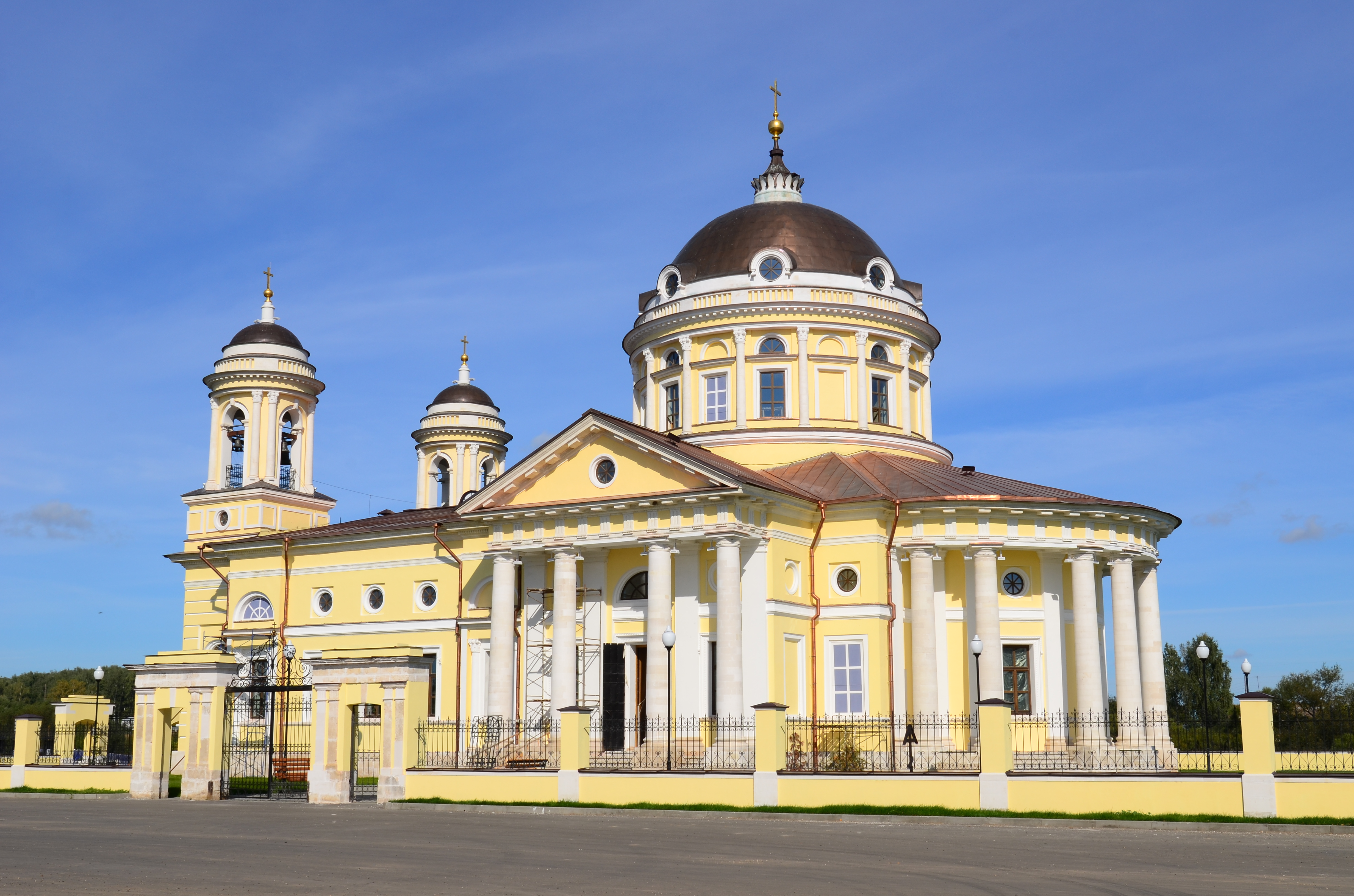 Церковь Сошествия Святого Духа: Шкинь, Коломенский район, Московская область